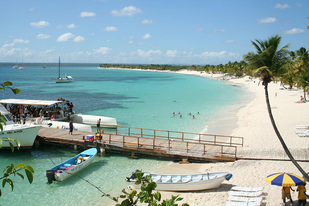 Isla Catalina, Dominicana